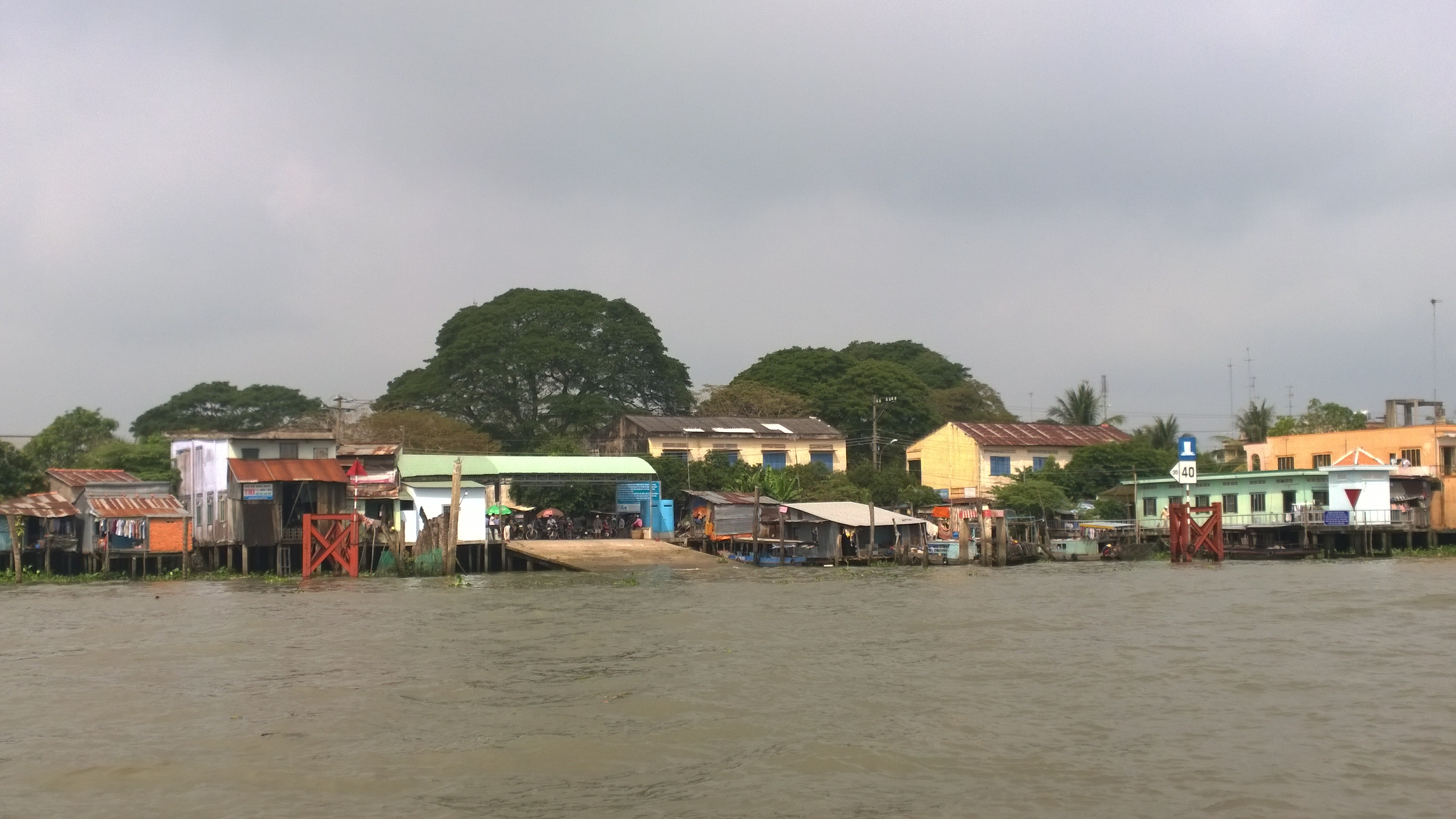 tt. Cái Bè, Cái Bè, Tiền Giang, Vietnam